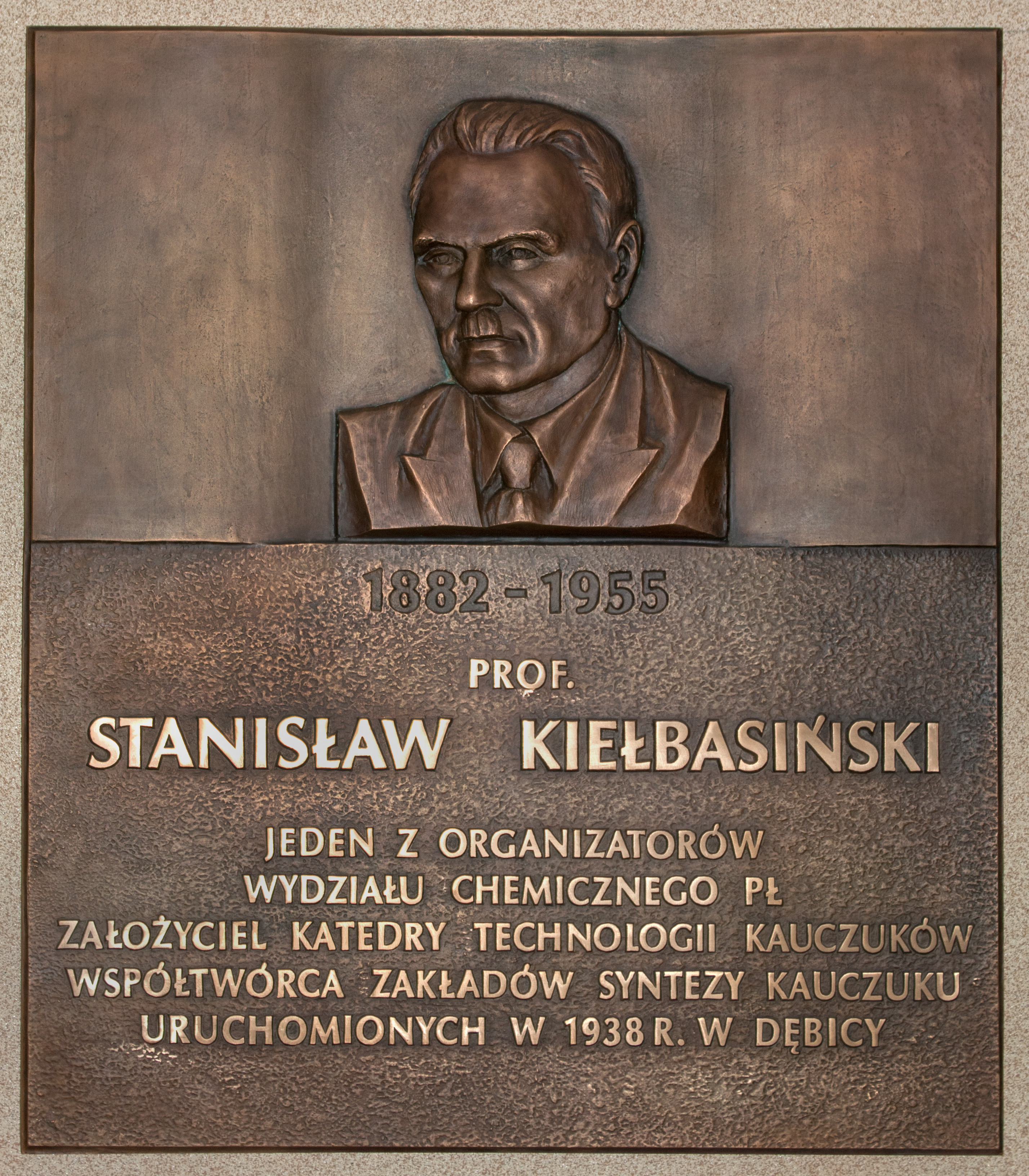 Tablica pamiątkowa prof. Stanisława Kiełbasińskiego